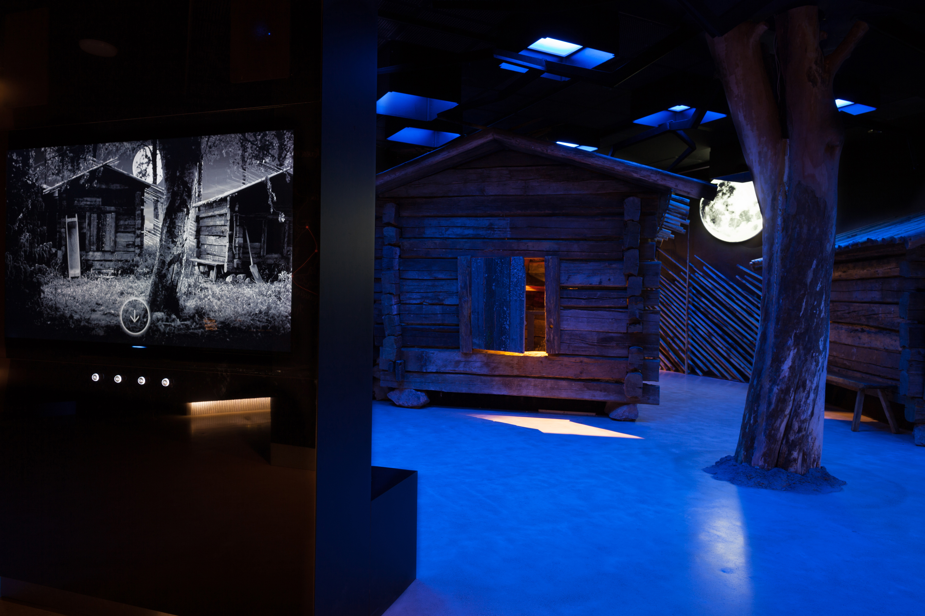 Kuva Postimuseon Viestinviejät-näyttelystä